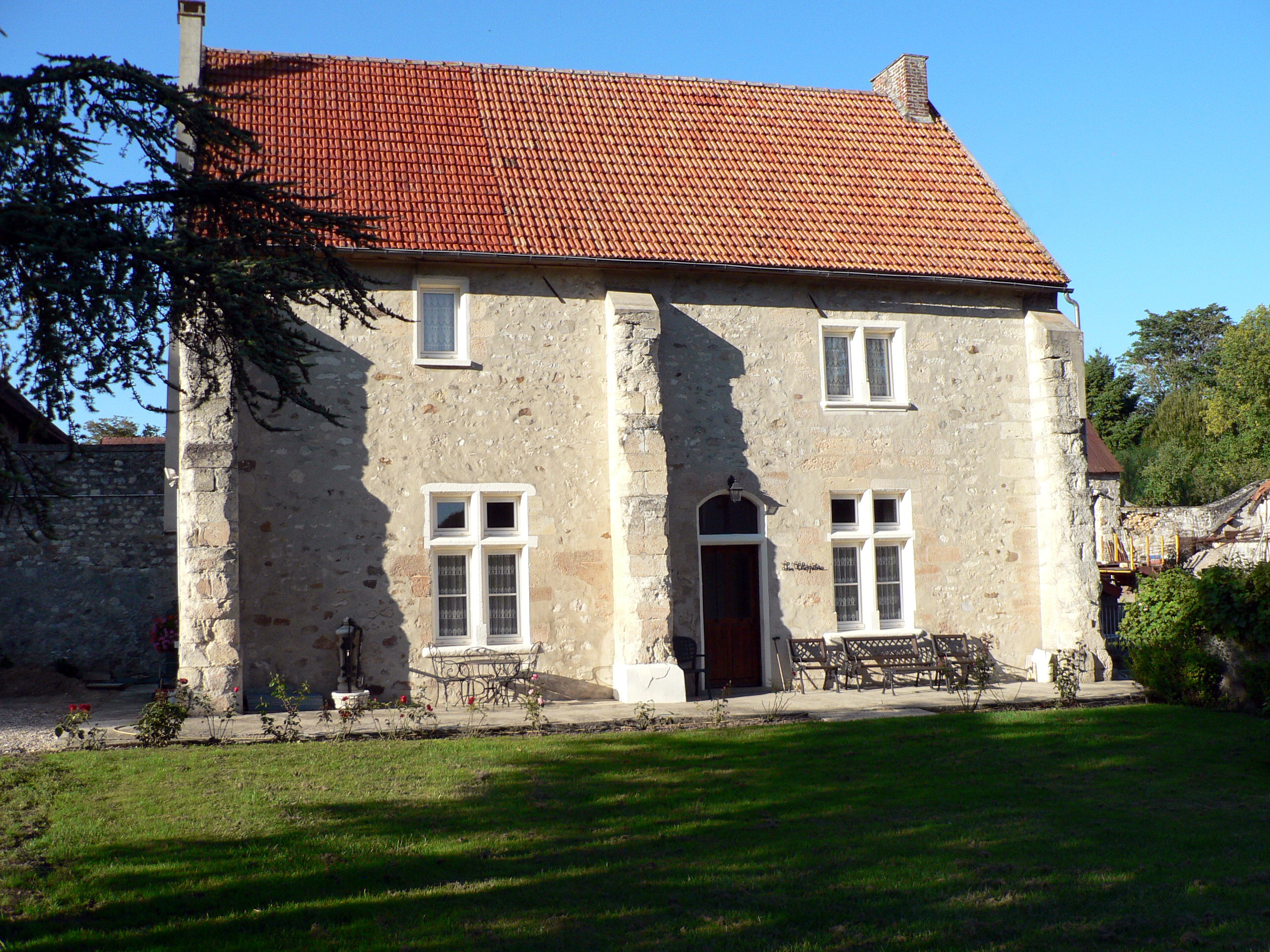 XVIe siècle ?